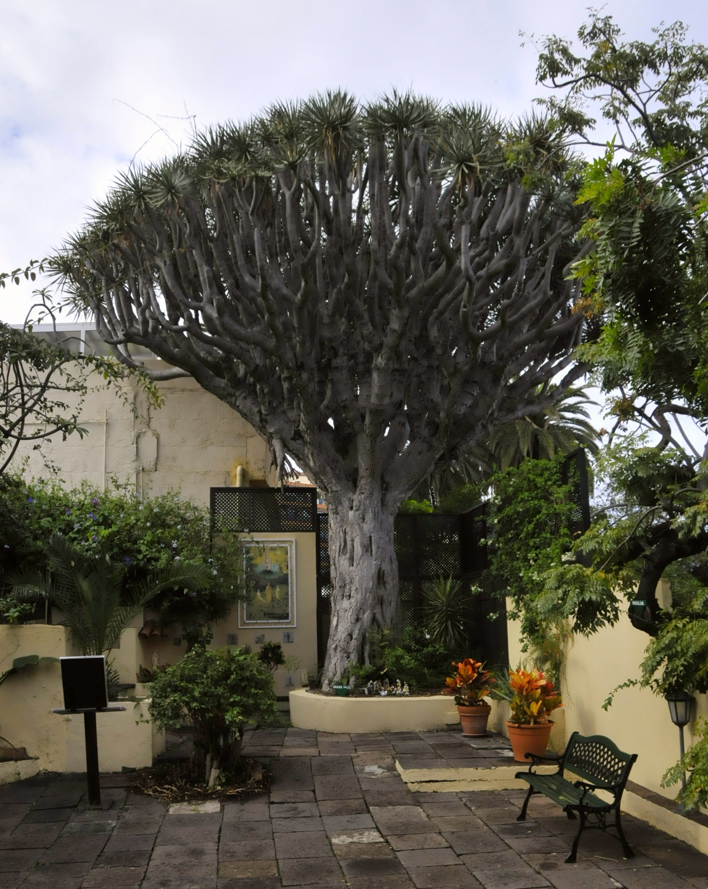 Drachenbaum im Sitio Litre, Puerto de la Cruz, Teneriffa